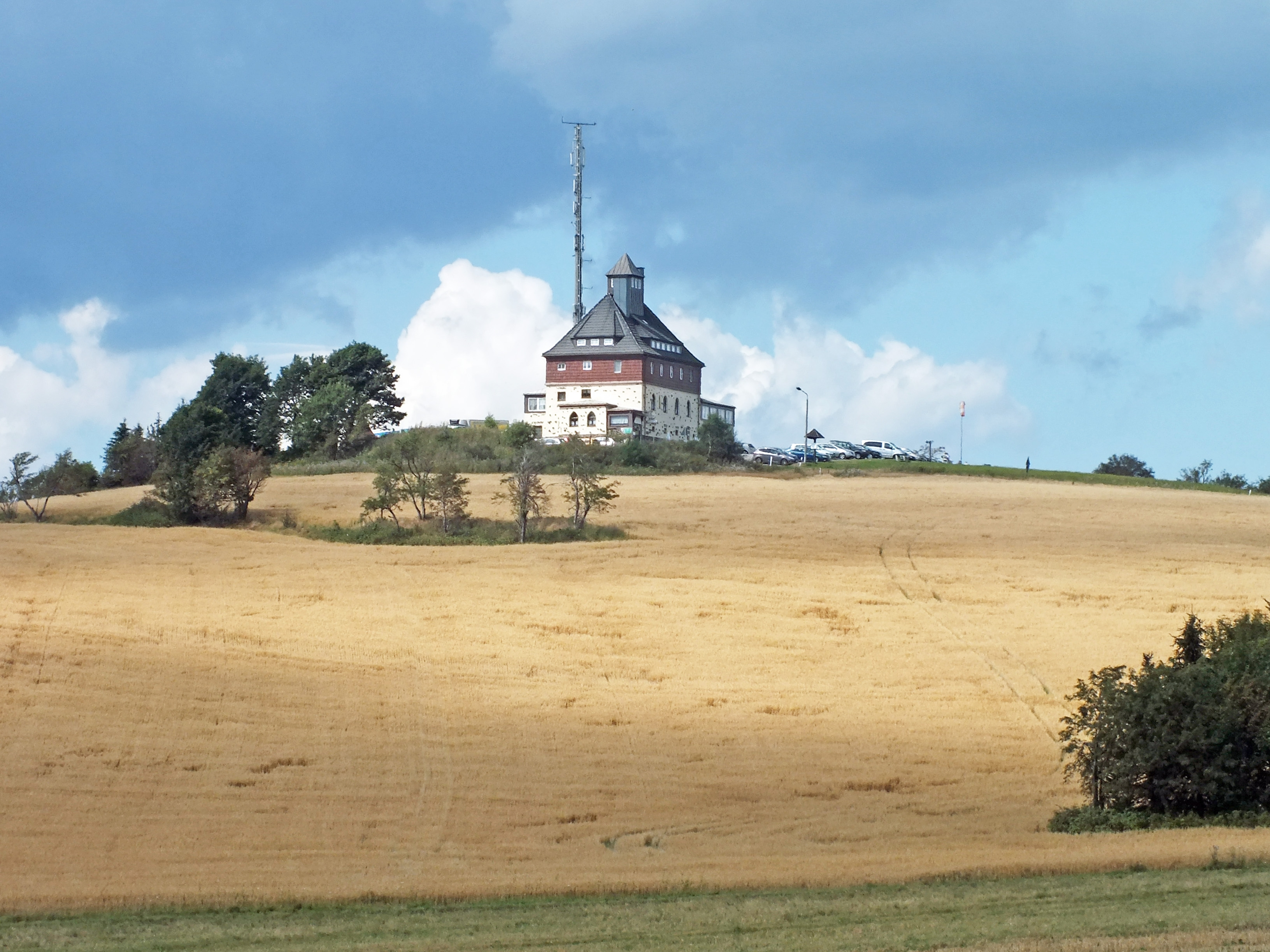 Am Schwartenberg